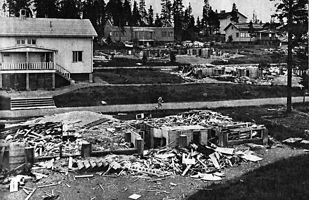 Laver, Norrbotten